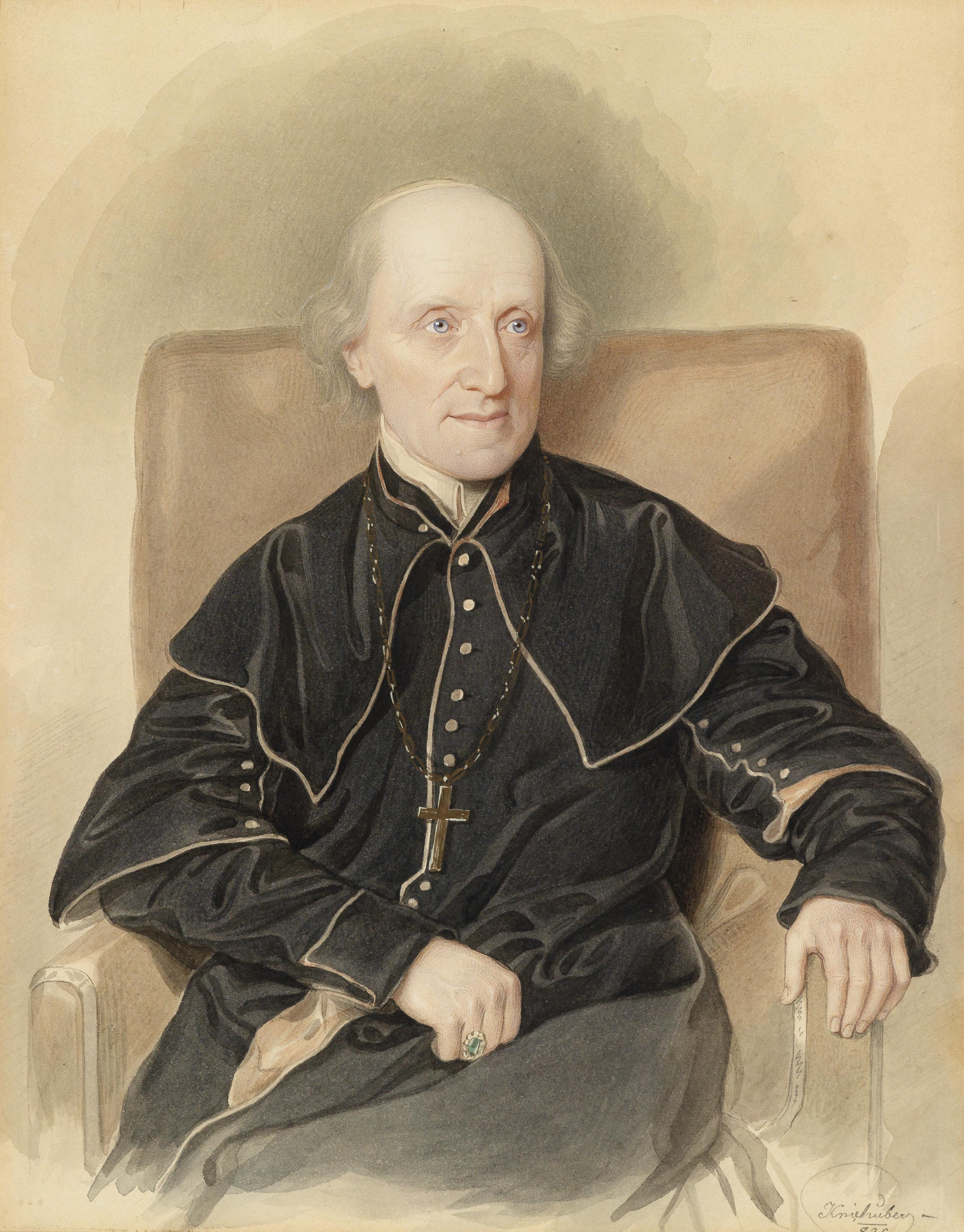 Bildnis des Vinzenz Eduard Milde, Bischof von Leitmeritz und Erzbischof von Wientitle QS:P1476,de:"Bildnis des Vinzenz Eduard Milde, Bischof von Leitmeritz und Erzbischof von Wien"